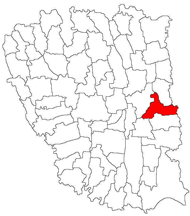 Categorie:Hărţi ale judeţului Galaţi